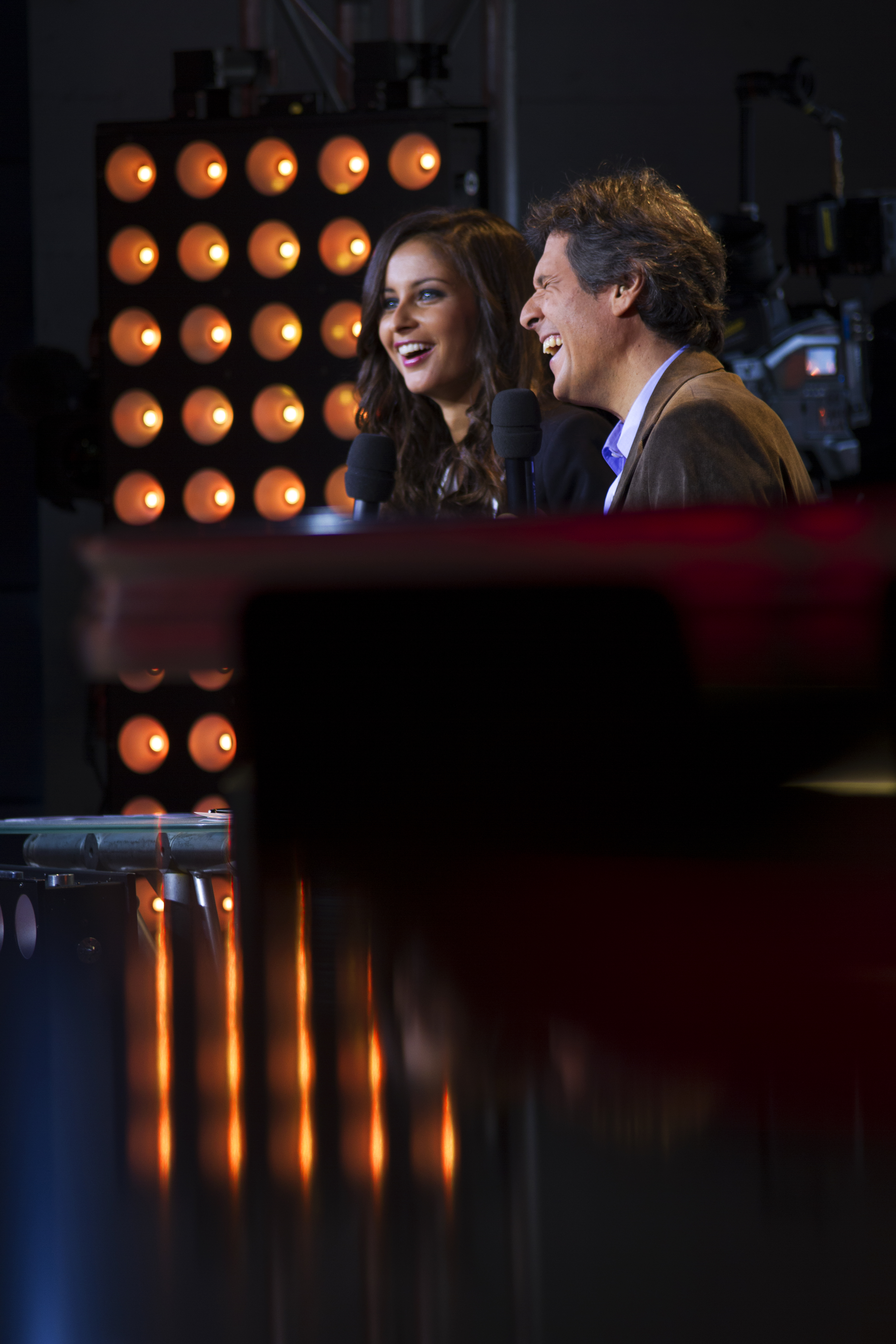 Malika Ménard et Jean Philippe Lustyk sur le plateau de Paris le Club, septembre 2013